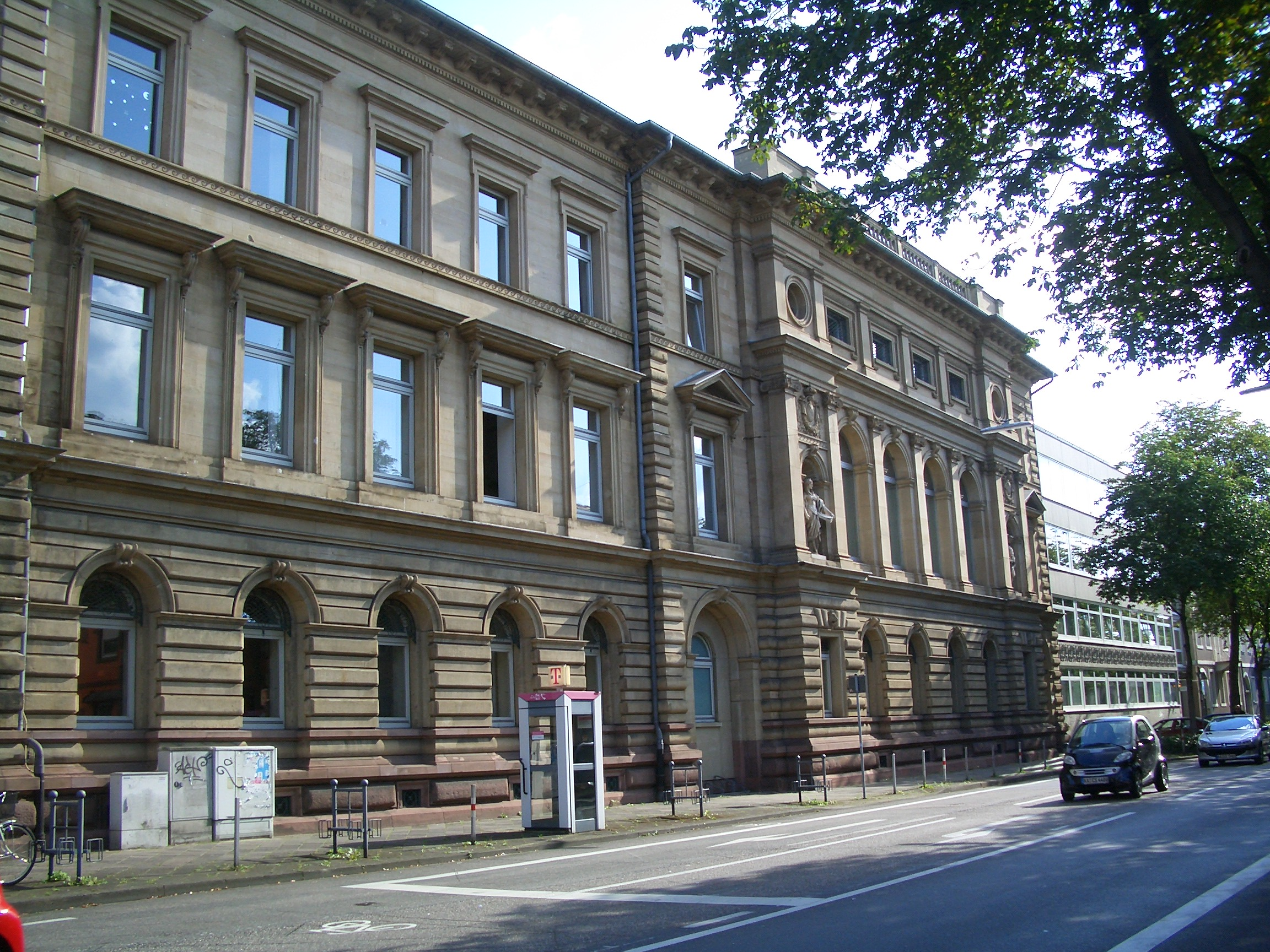 Landgericht Karlsruhe, Schwurgerichtstrakt